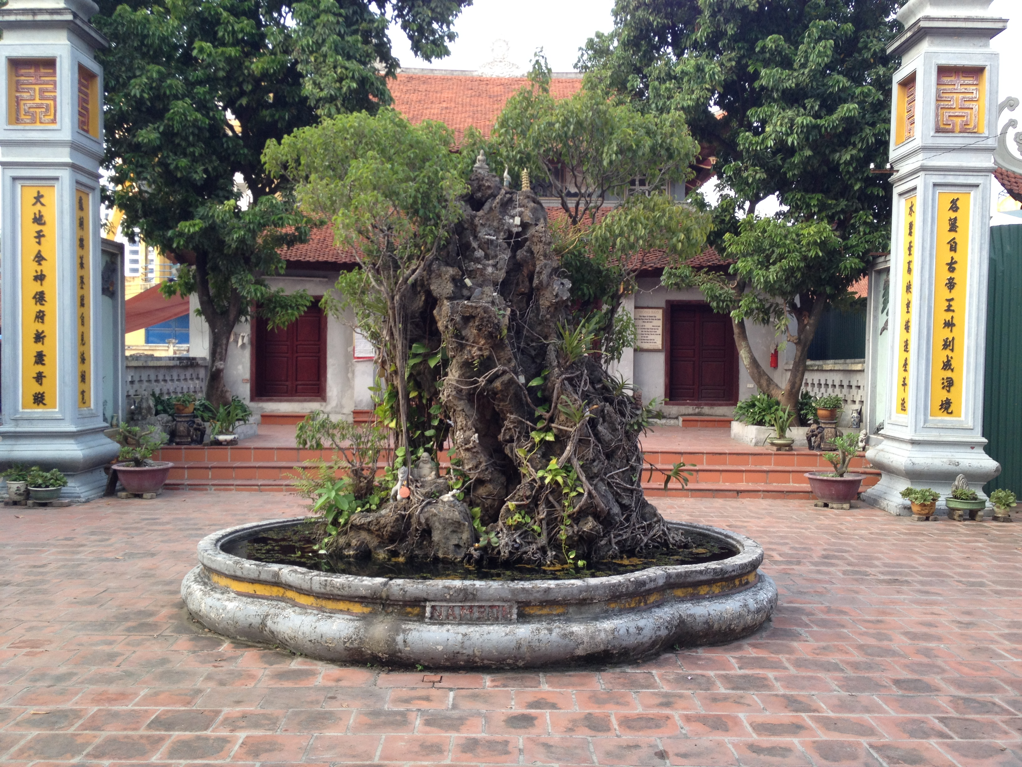 Bích Câu Đạo Quán, số 12 phố Cát Linh, Hà Nội, Việt Nam.